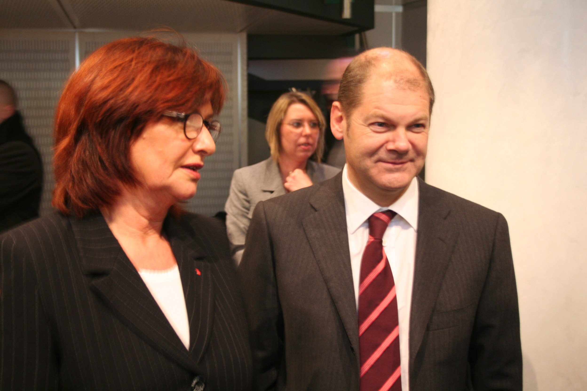 Mit Ute Kumpf